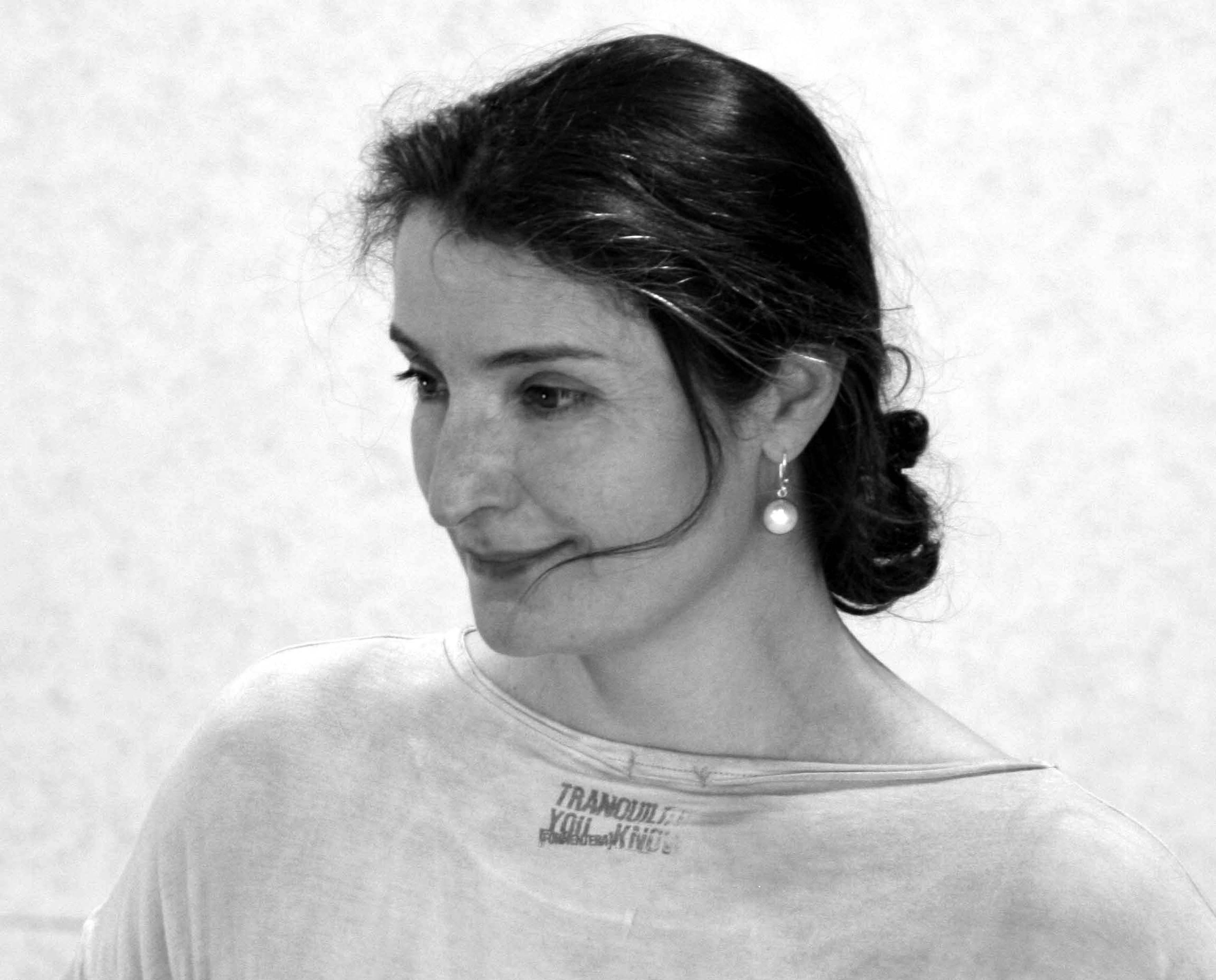 Catherine Allard en el ensayo del espectáculo IDENTITIES.